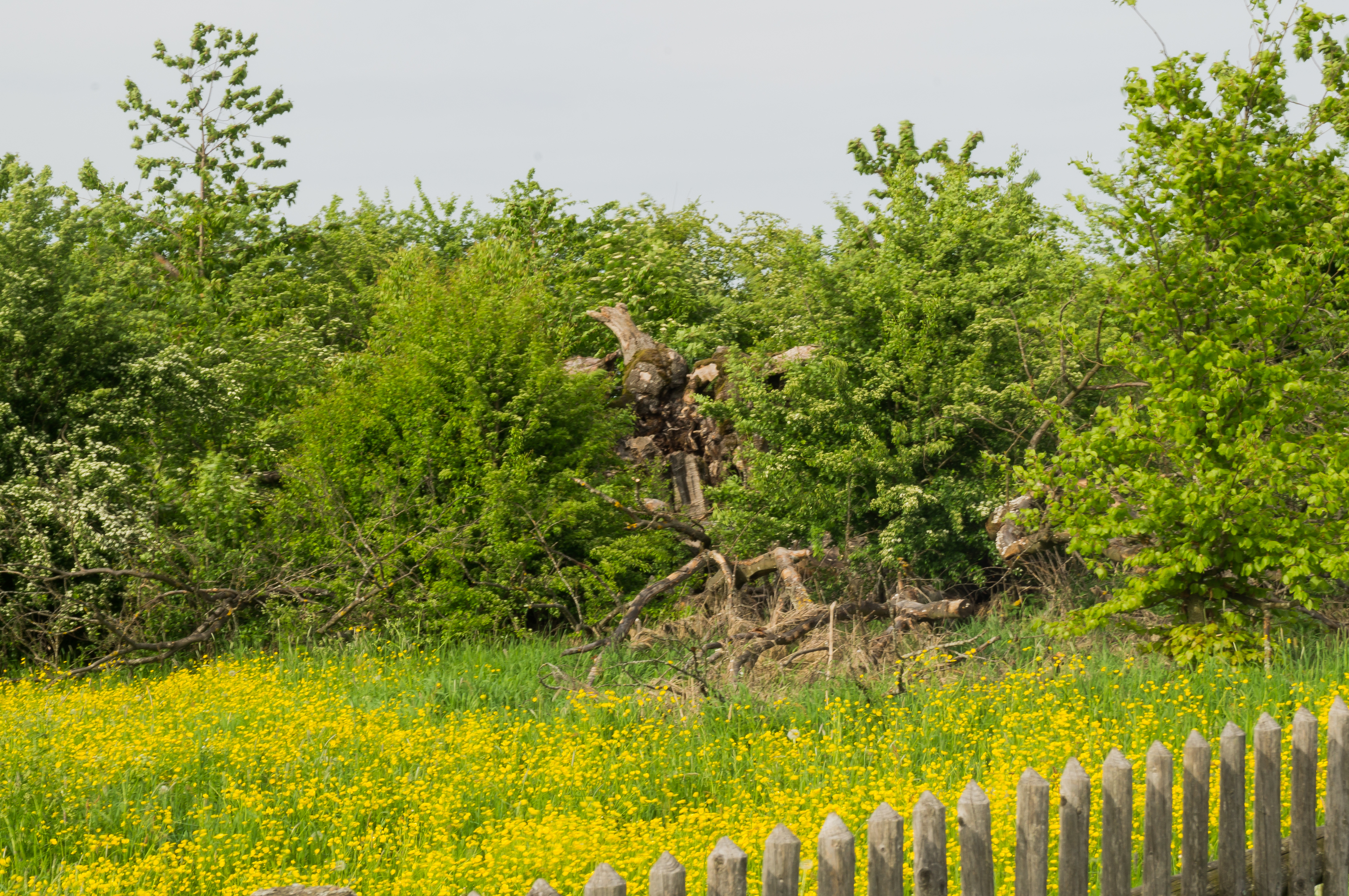 Die Überreste der einst mächtigen Bavaria - Buche